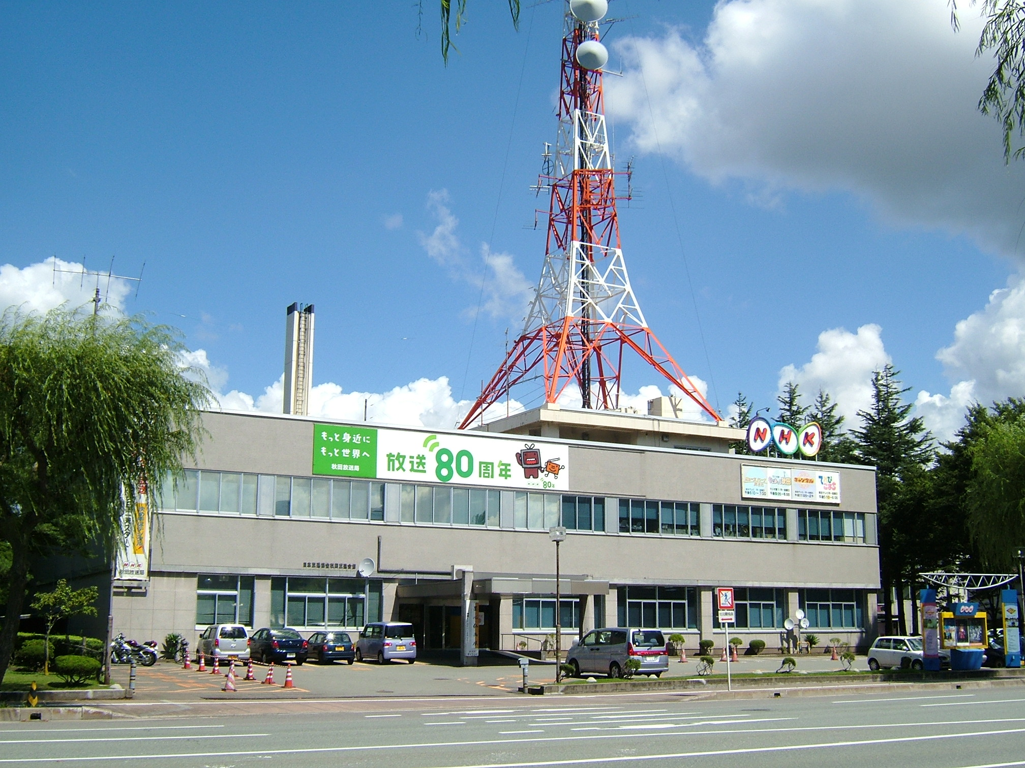 NHK秋田放送局の旧局舎です。